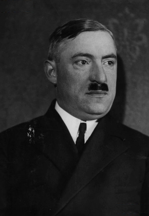 Doktor teologii, profesor Uniwersytetu Warszawskiego, członek PAU, ksiądz Jan Szeruda